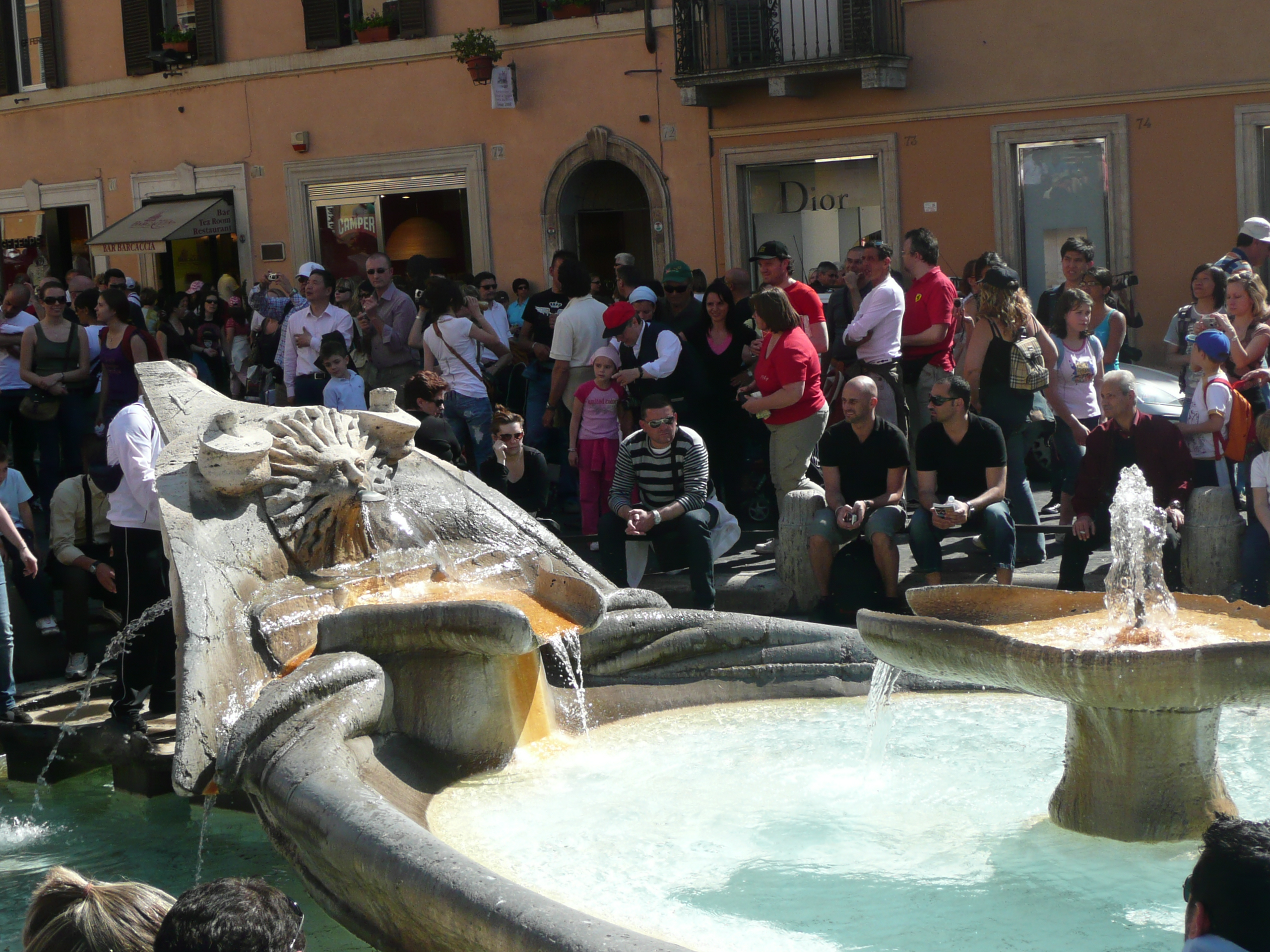 Фонтан Баркачча у Римі